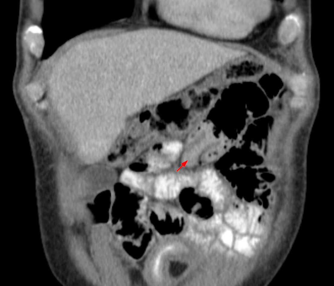 Dünndarminvagination in der Computertomographie. Axial nur in der Bildfolge erkennbar, aber coronar gut sichtbar.